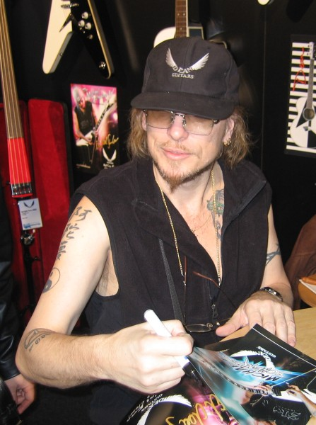 Michael Schenker signiert am Dean-Stand auf der Musikmesse Frankfurt im April 9 2005